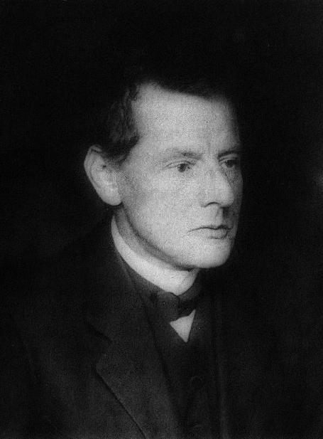 Heinrich Federer (1866–1928) Schriftsteller, kath. Priester